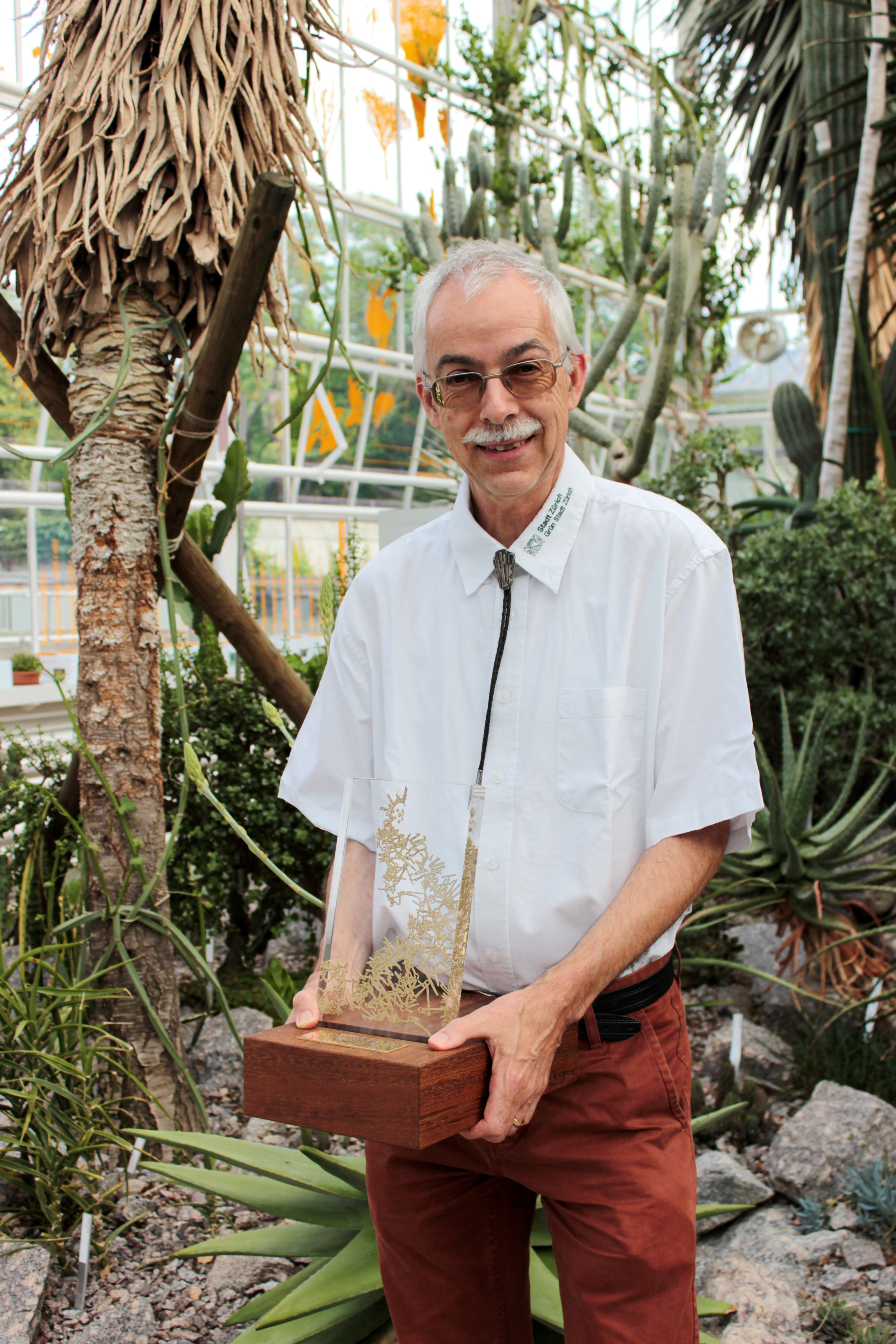 Urs Eggli, wissenschaftlicher Mitarbeiter an der Sukkulenten-Sammlung Zürich, mit dem Cactus d'Or, der ihm am 6. Juni 2015 im Jardin Exotique de Monaco überreicht wurde.